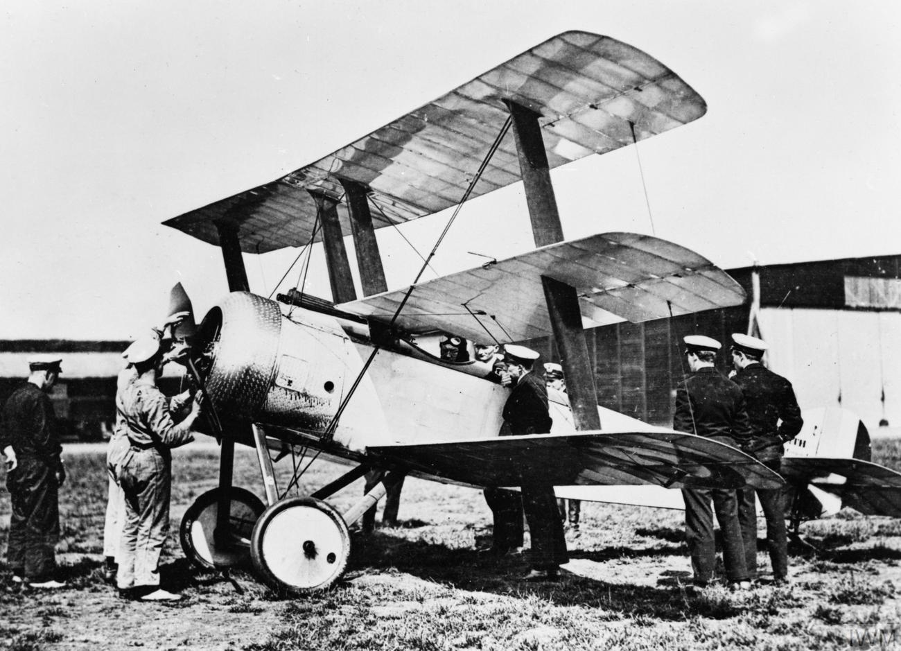 Triplane